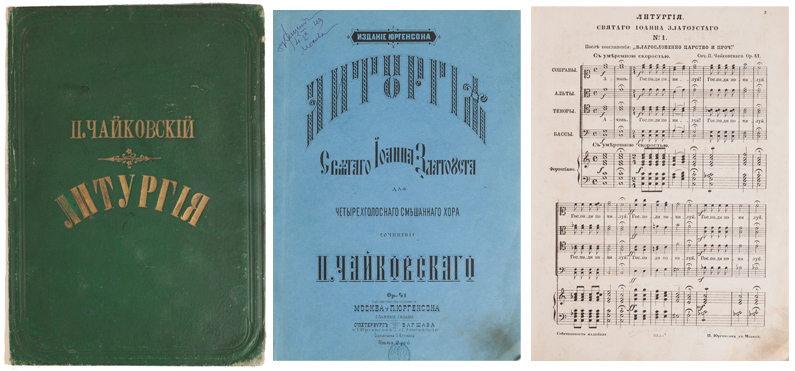 Обложка изд. Юргенсона. Сочинения П.И. Чайковского